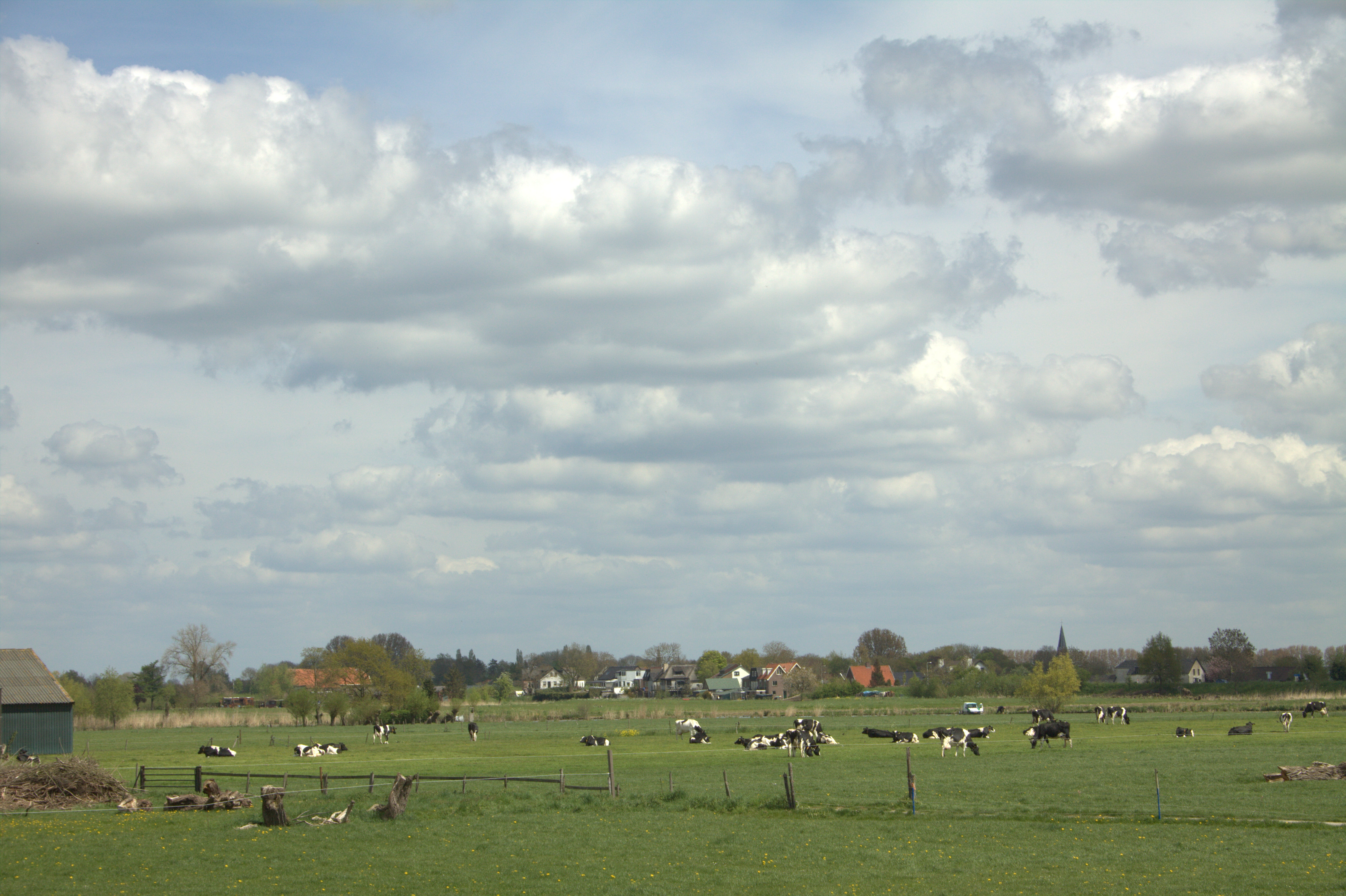 Het dijkdorp Gellicum gezien vanaf de Lingedijk in Acquoy.